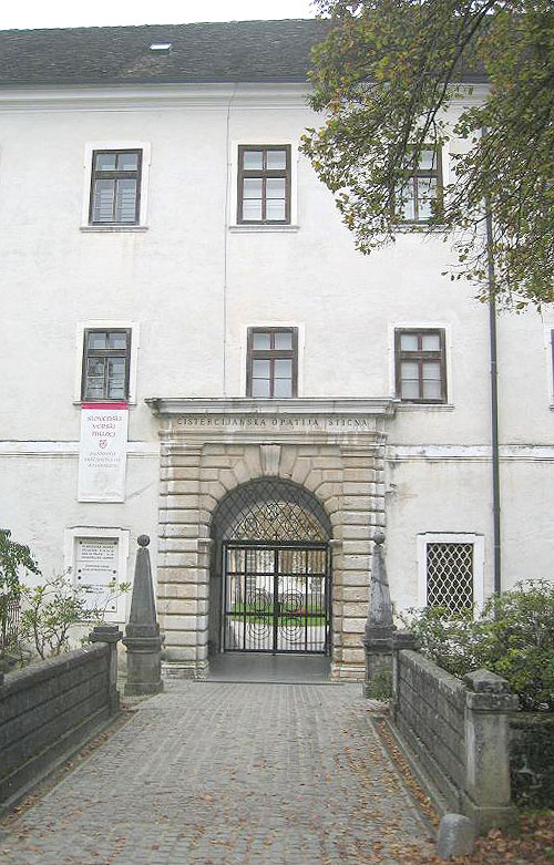 Monastery Sittich, Slovenia / samostan Stična, Slovenija / Kloster Sittich, Slowenien